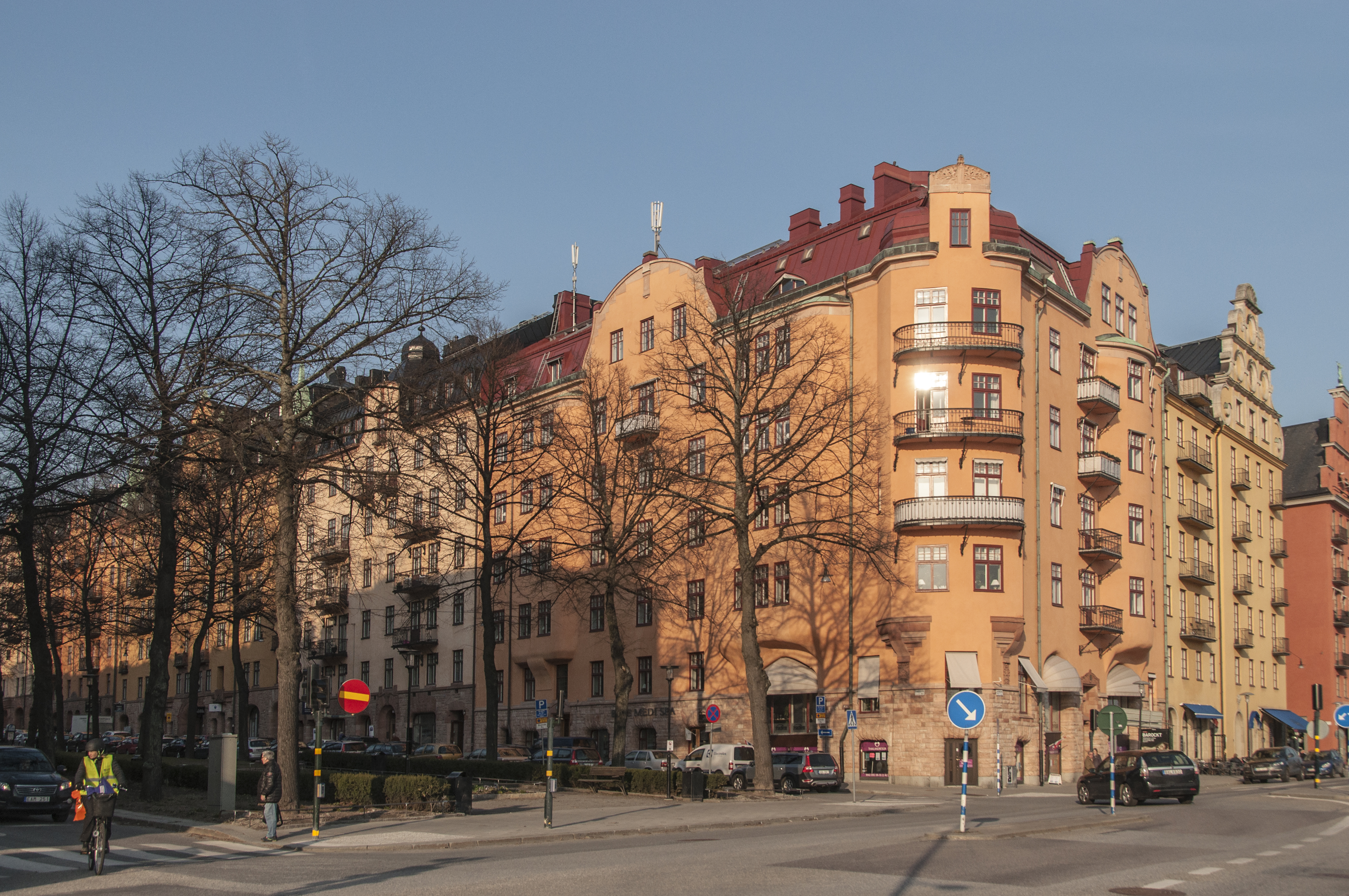 Vattuormen 10, Kungsholmstorg 2, Norr Mälarstrand 34, Nybyggnadsår 1902 - 1903, Håkan Bergkvist (Byggmästare) P. S. Graham (Byggherre) Sigfrid Cronstedt (Arkitekt)